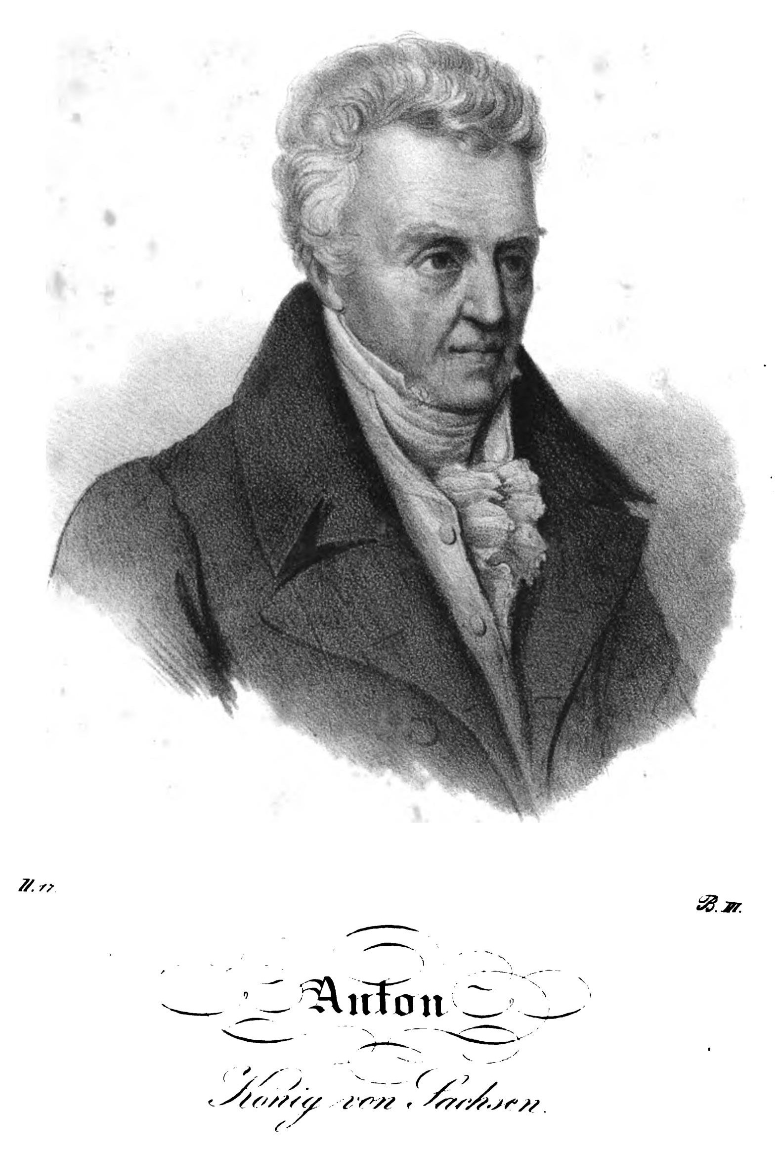 Saxonia Museum für saechsische Vaterlandskunde. Band 2. Dresden: Pietzsch und Comp. Siehe File:Saxonia Museum für saechsische Vaterlandskunde II.djvu